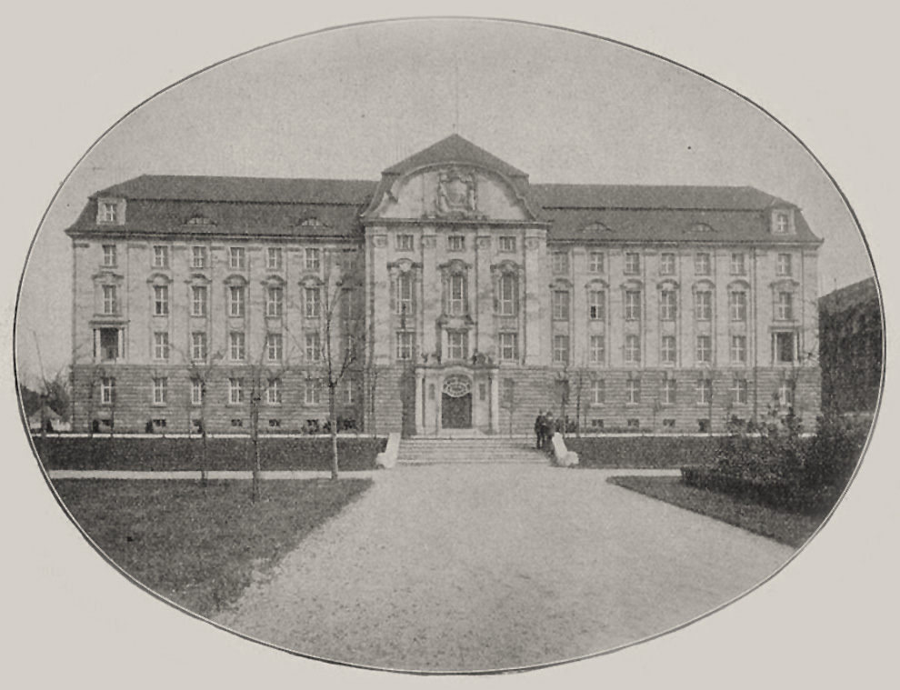 Das neue Oberlandesgerichtsgebäude an der Cecilienallee in Düsseldorf. Das neue Justizhaus wird demnächst seiner Bestimmung übergeben. Foto P. Lölgen, veröffentlicht in "Rhein und Düssel" 17. April 1910